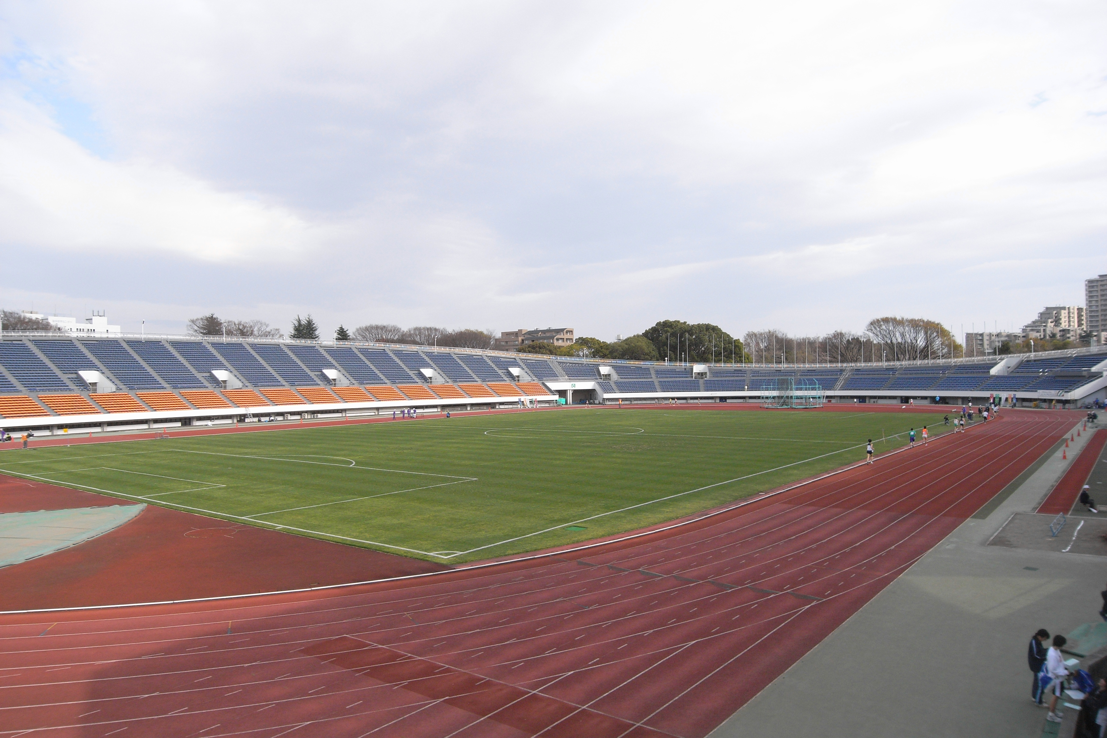 Metropolitan komazawa olynpic park 駒沢オリンピック公園総合運動場陸上競技場